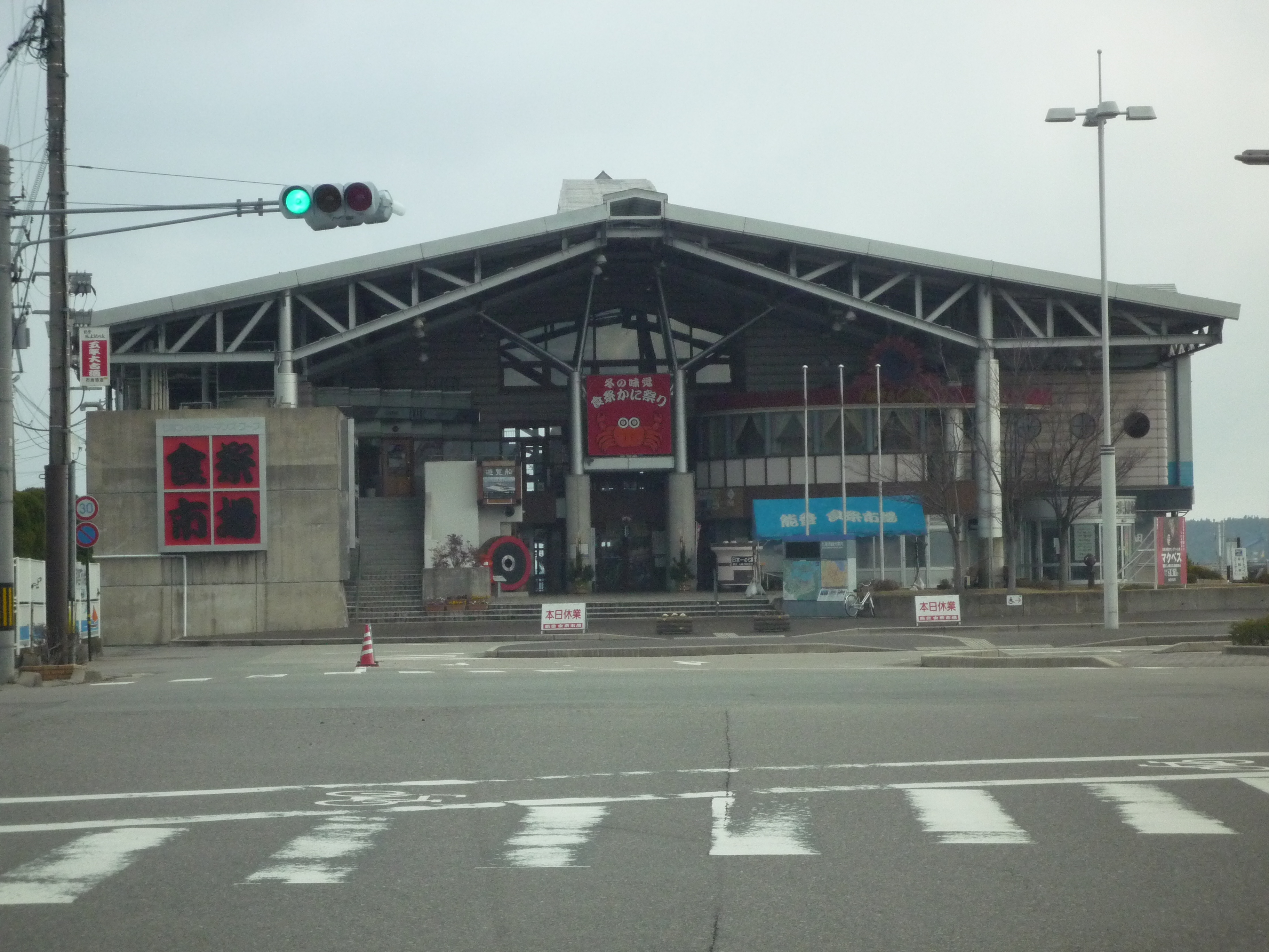 notoshokusaiichiba